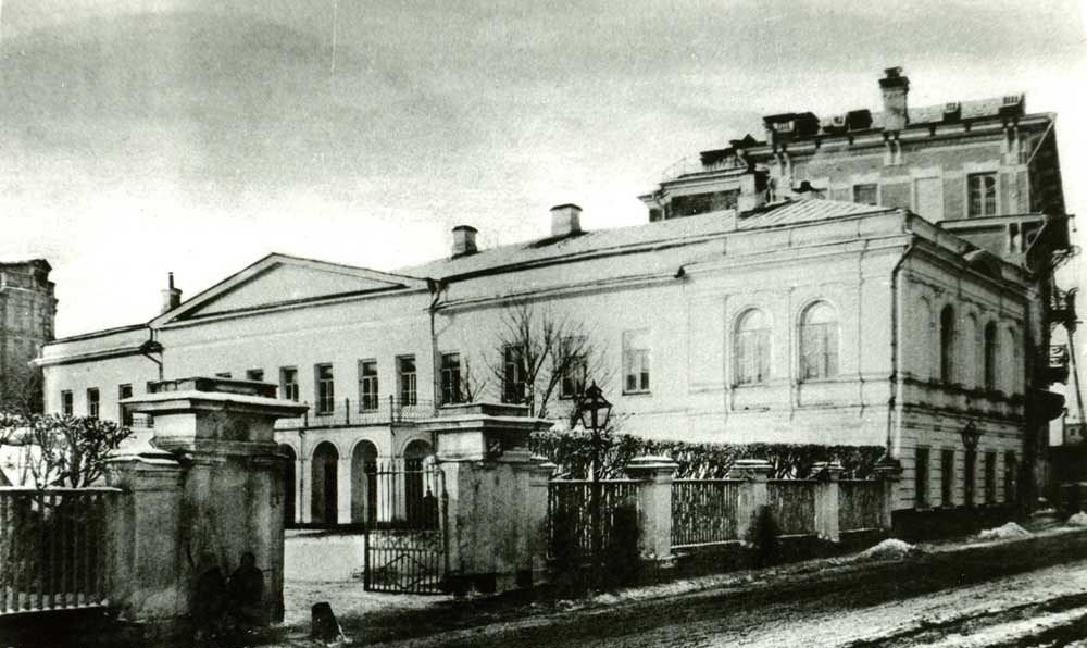 Дом Талызина, Никитский бульвар, 7; В 1840-1850- е гг. владение графа А. П. Толстого. Дом, где умер в Москве Н. В. Гоголь